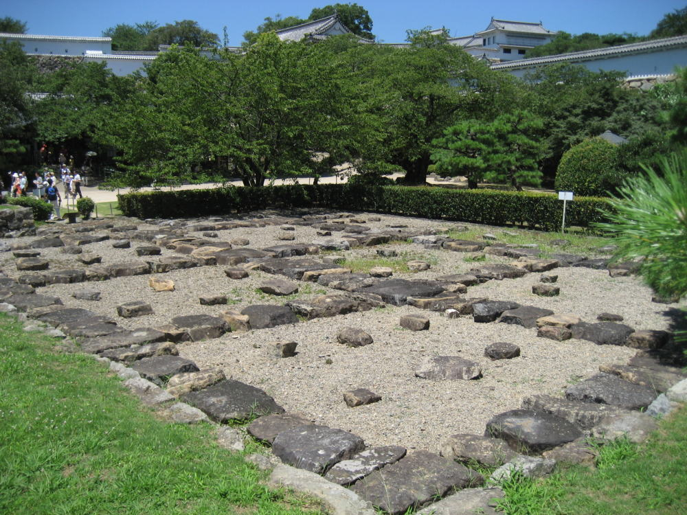 姫路城三の丸に移設保存されている築城当時の大天守礎石